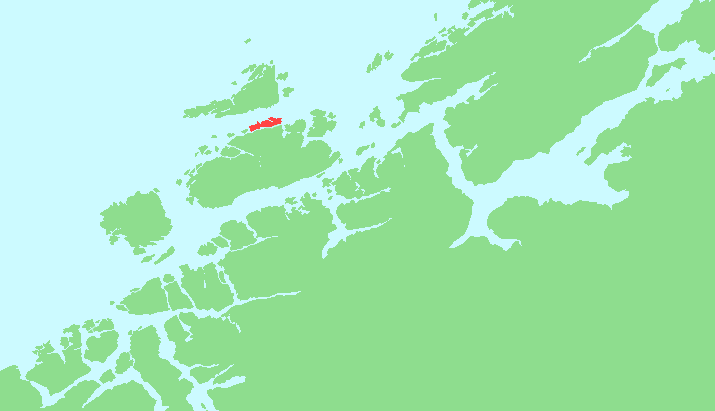 Locator map of Dolmøya, Sør-Trøndelag, Norway